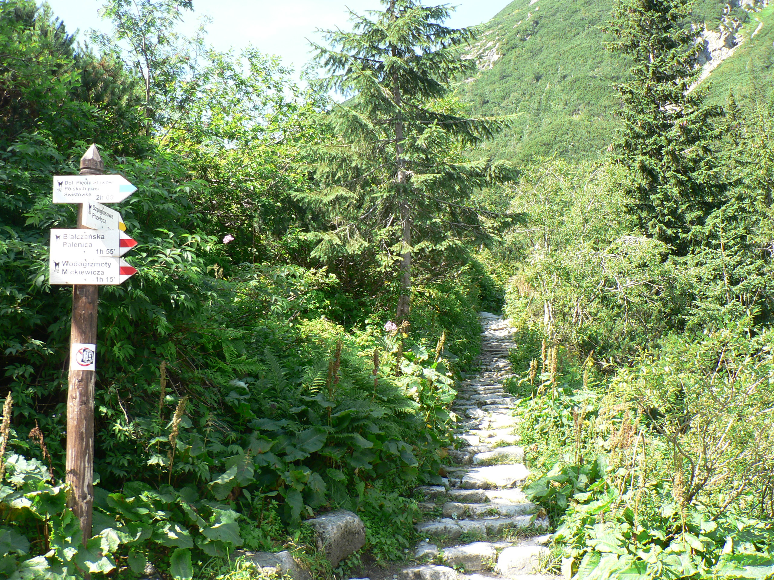 Początek Ceprostrady nad Morskim Okiem